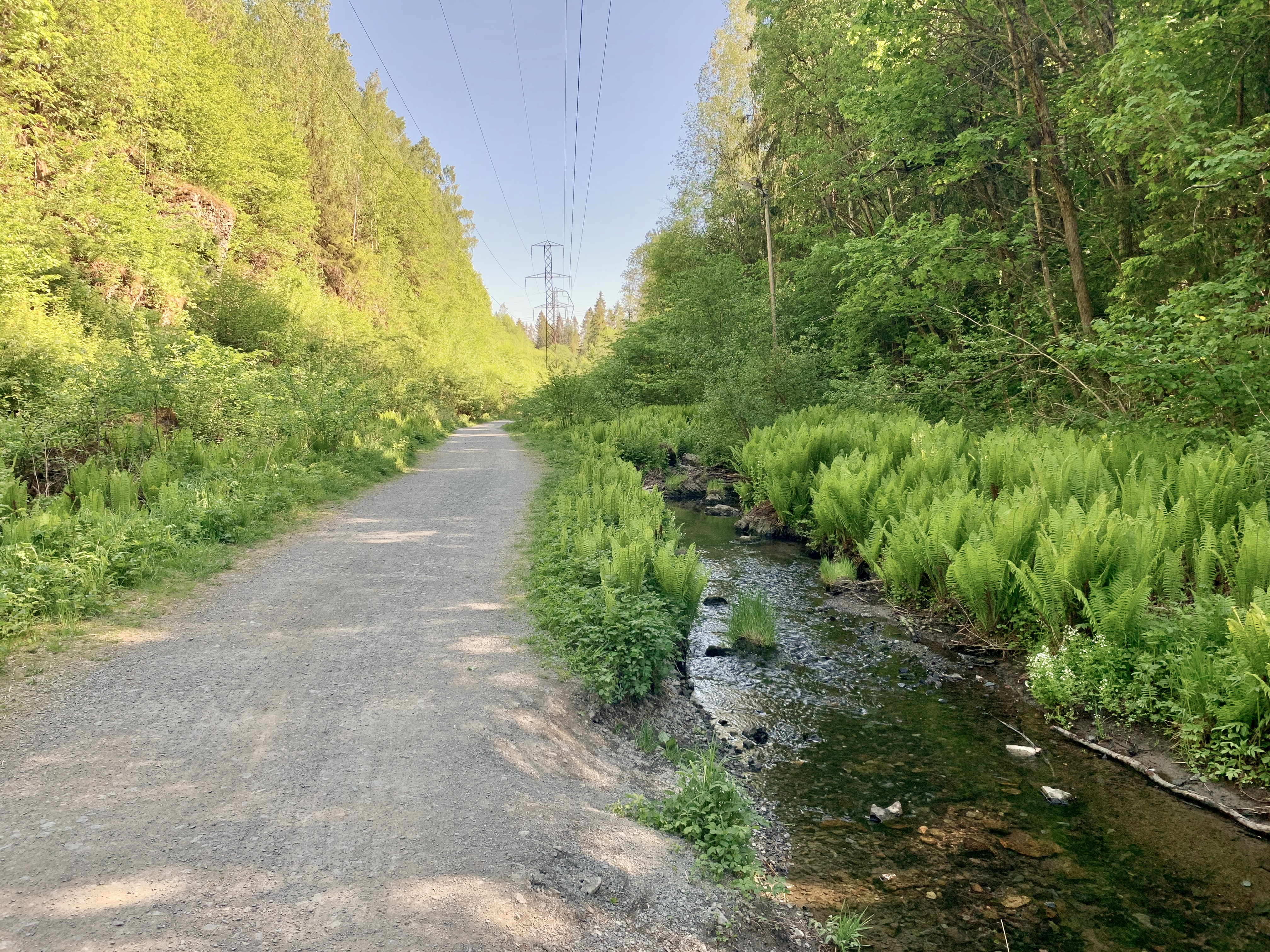 Mærradalen i Oslo.